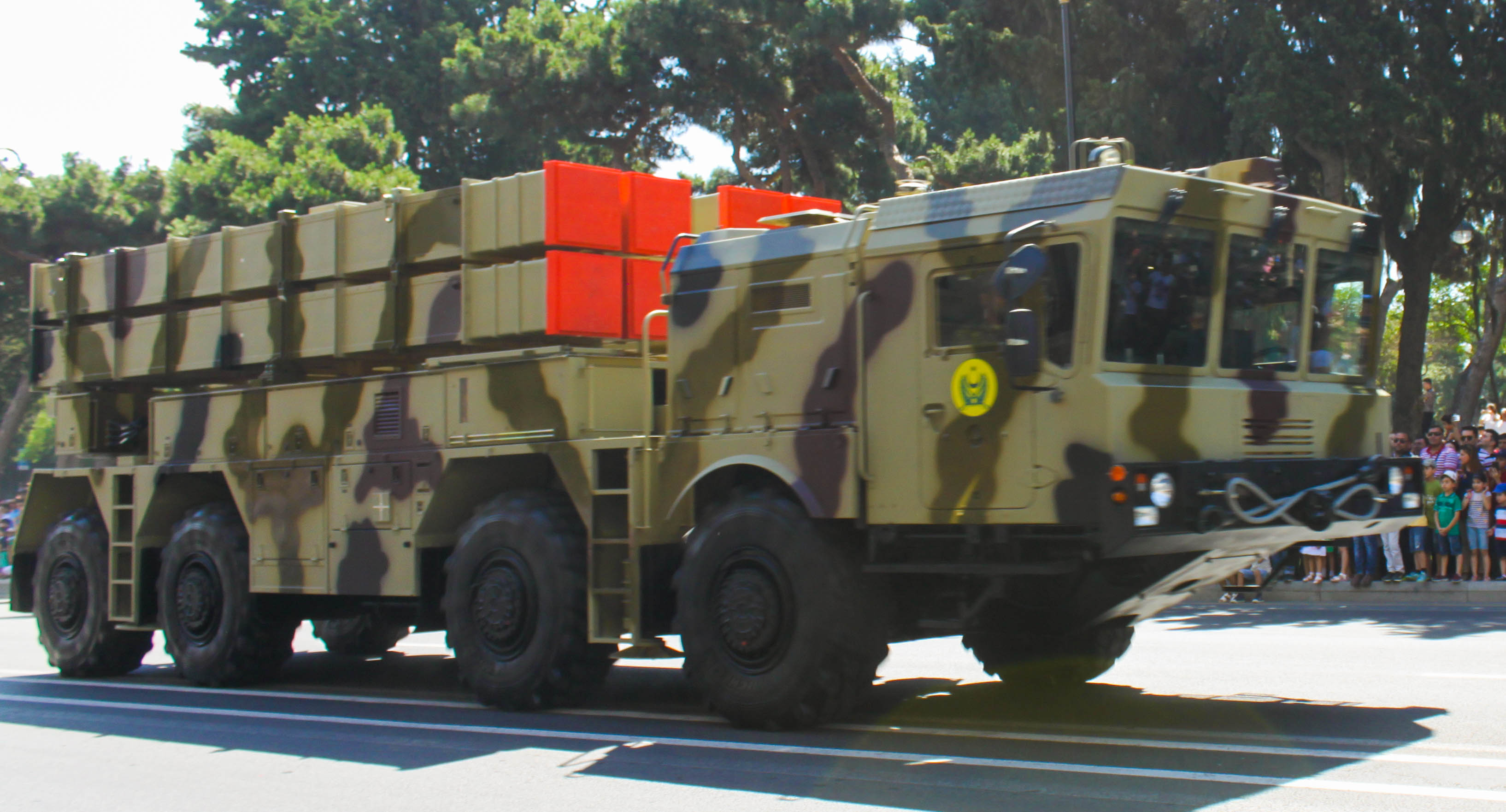 Military parade 2018